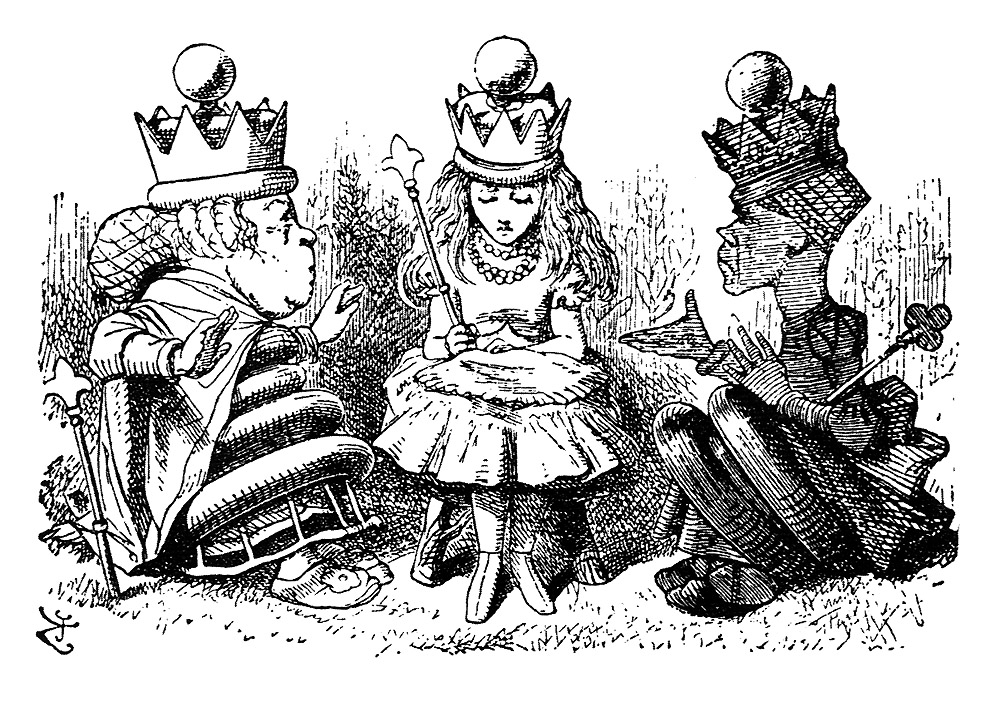 гравюра Джона Тенниела